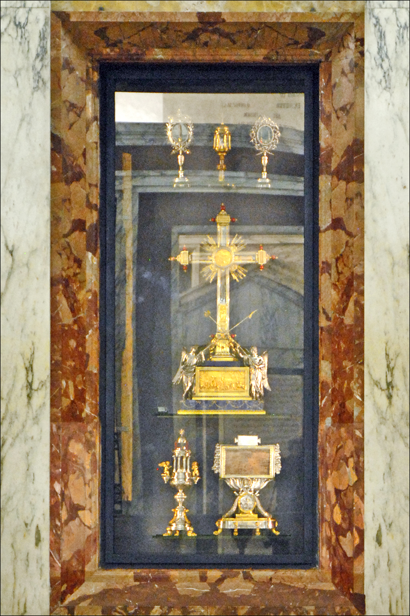 Reliques de la vraie Croix et de la Passion dans la chapelle Sainte-Hélène Basilique Sainte-Croix-de-Jérusalem, Santa Croce in Gerusalemme ____________________ La basilique a été construite sur le lieu où se trouvait le palais Sessorien, résidence de la mère de Constantin, l'impératrice Hélène. Elle partit à Jérusalem et en ramena en 329 un fragment de la vraie Croix. Cette relique a d'abord été conservée dans une chapelle construite au sein du palais : la chapelle Sainte-Hélène. Une église plus vaste a ensuite été bâtie mais elle n'a eu son aspect actuel qu'au XVIIIème siècle. L'architecte Domenico Gregorini (1692-1777) a conçu cette façade convexe et son vestibule ovale dans le style de Borromini. La Chapelle de la Croix et des Reliques de la Passion, a été souterraine jusqu'en 1930 date à laquelle une nouvelle chapelle a été édifiée. On accède aujourd'hui par le fond de l'église à cet important lieu de pèlerinage chrétien. La chapelle des Reliques contient des morceaux de la Croix du "bon larron", crucifié aux cotés de Jésus, des fragments de la vraie Croix, une partie de l'inscription de la Croix ; INRI (Jésus de Nazareth roi des Juifs), deux épines de la couronne du Christ, le doigt de Saint-Thomas, un clou de la Passion, etc. Article de Wikipedia